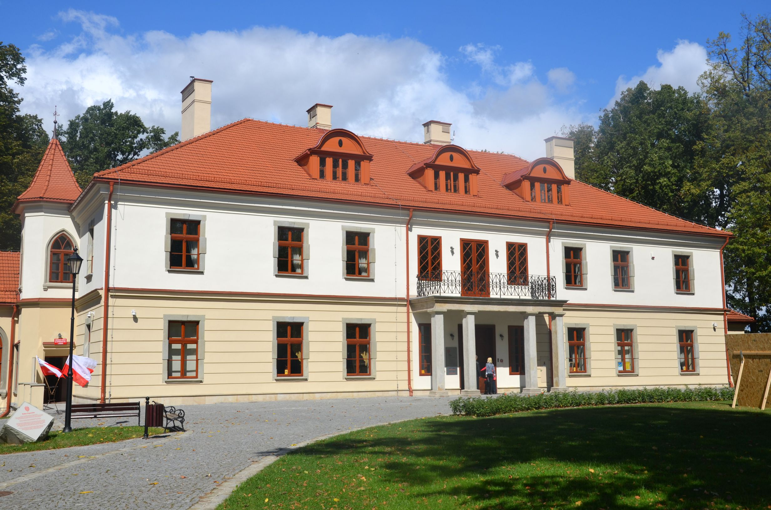 Schloss von Czecz-Lindewald